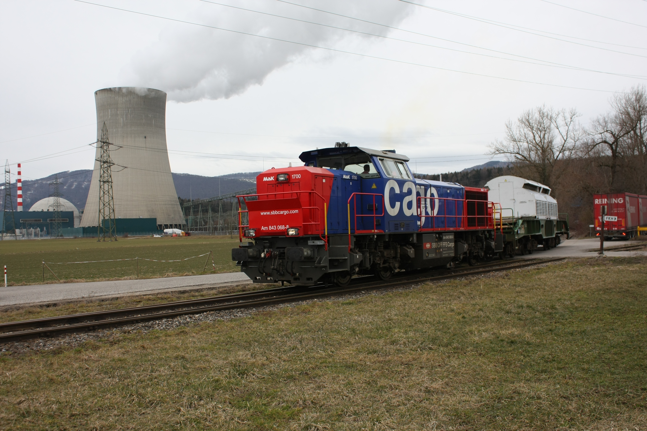 L'Am 843 068-8 des CFF pousse l'Uaais 33 87 994 5 018-8 de la SNCF avec un Castor (conteneur de transport pour matériel radioactif) dans l'enceinte de la centrale nucléaire de Gösgen.